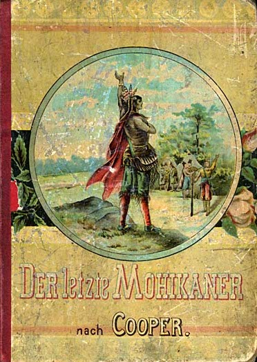 Der letzte Mohikaner von James Fenimore Cooper. Für die deutsche Jugend bearbeitet, sowie mit einer Einleitung versehen von Dr. O. Heinrichs, Oberlehrer. Mit farbigem Titelbild, 8 Tonbildern und 23 Bildern im Texte. Zweite durchgesehene Auflage. Münster i. W. 1899, Druck und Verlag der Aschendorffschen Buchhandlung. Die erste Auflage ist 1890 erschienen. Die im Buch befindlichen Illustrationen stammten von Michał Andriolli für die um 1885 bei Libraire de Firmin-Didod et Cie erschienene französische Cooper-Ausgabe.